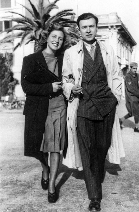 Elena Benvenuti (1912 - 2010) e Walter Binni (1913 - 1997)